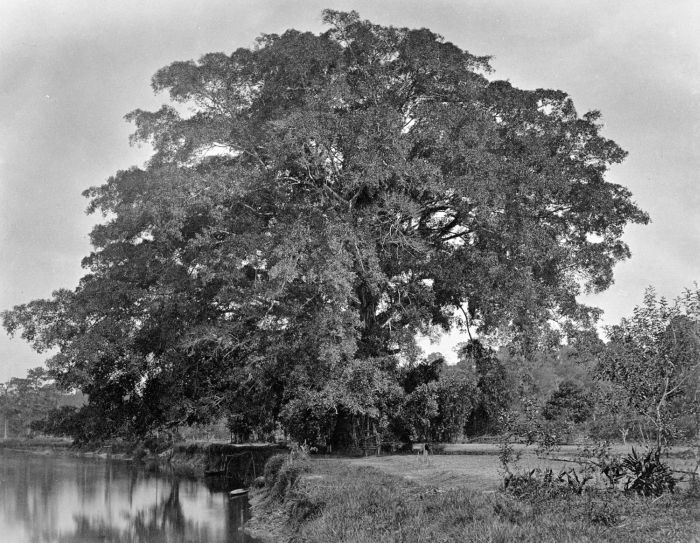 Foto. Deze foto is gemaakt tijdens de Sumatra Expeditie van 1877-1879. Landschappen uit de afdeeling Rawas.. Waringin in de omgeving van Soeroelangoen, in het district Rawas, Sumatra